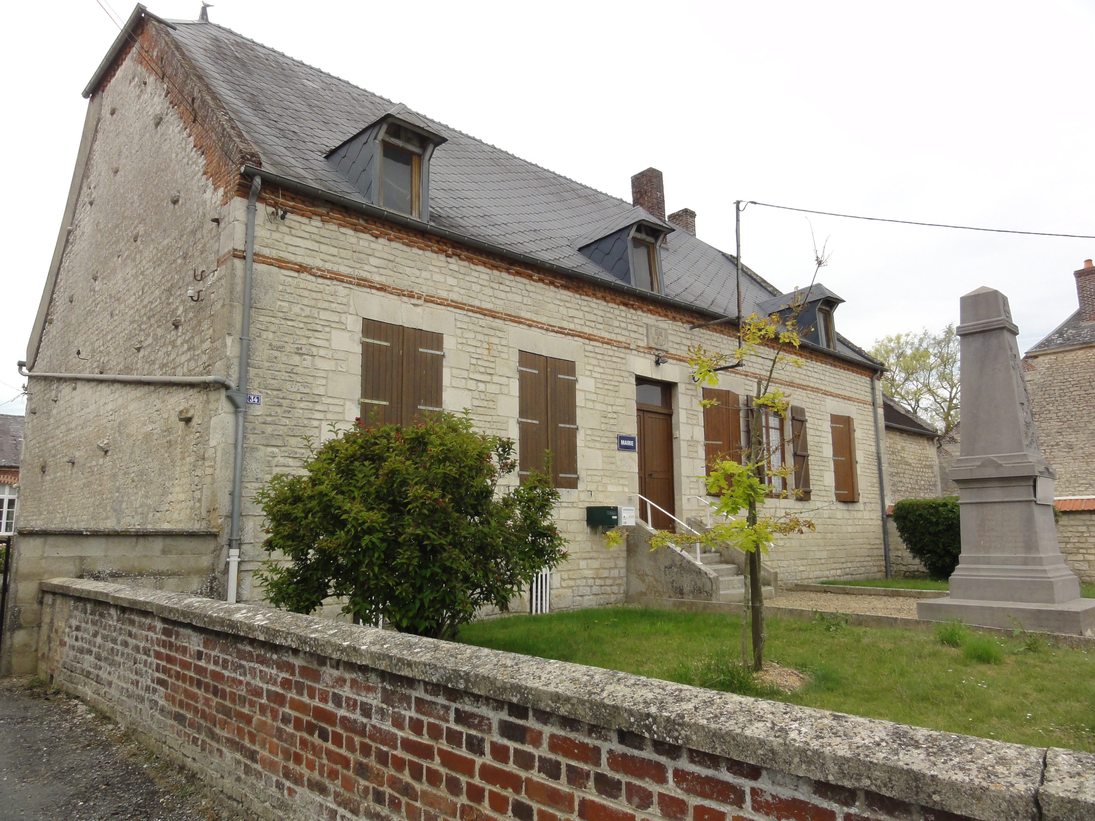 La Ville-aux-Bois-lès-Dizy (Aisne) mairie